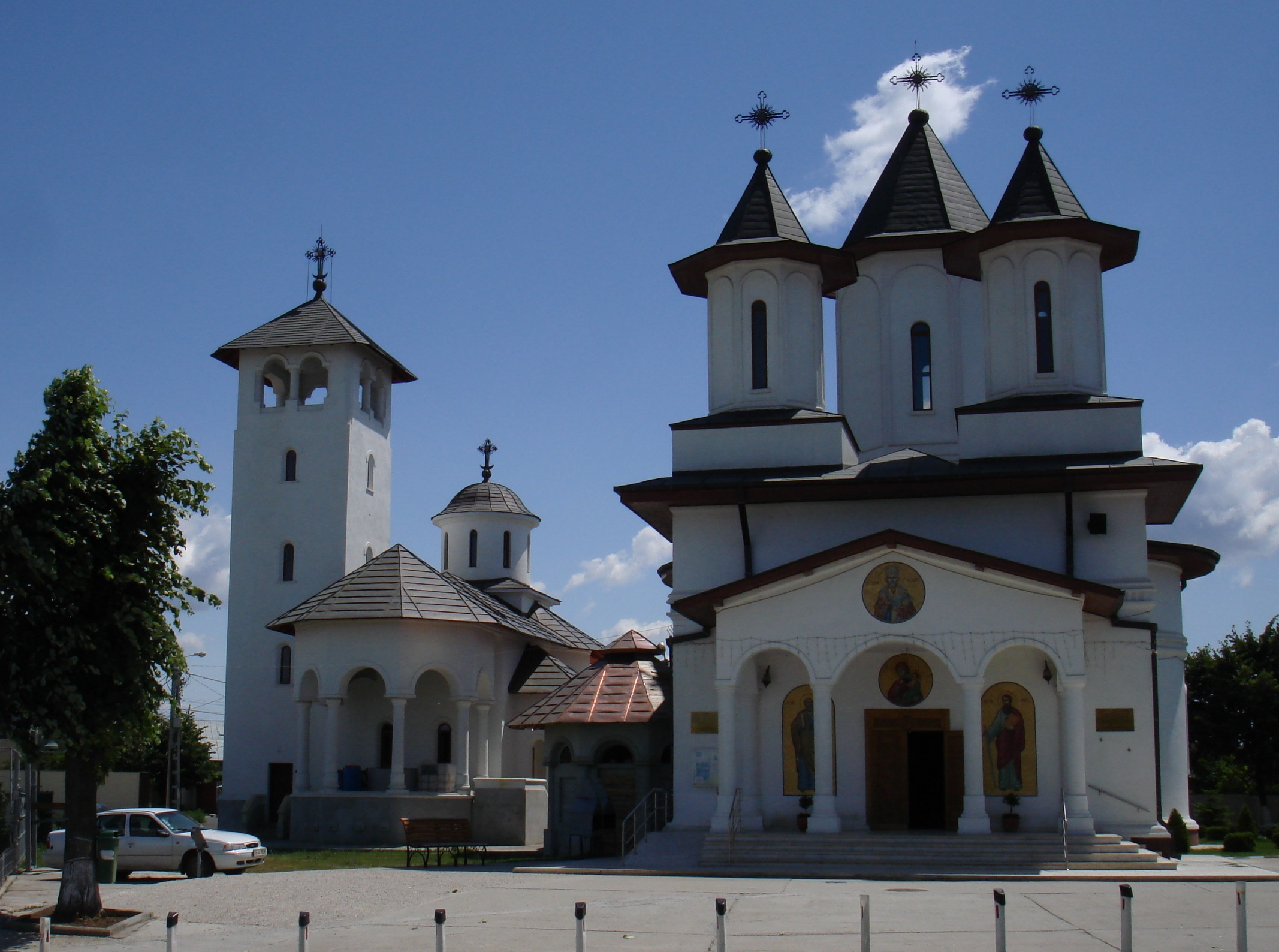 Biserica din Chiajna, Ilfov, construită în 1831